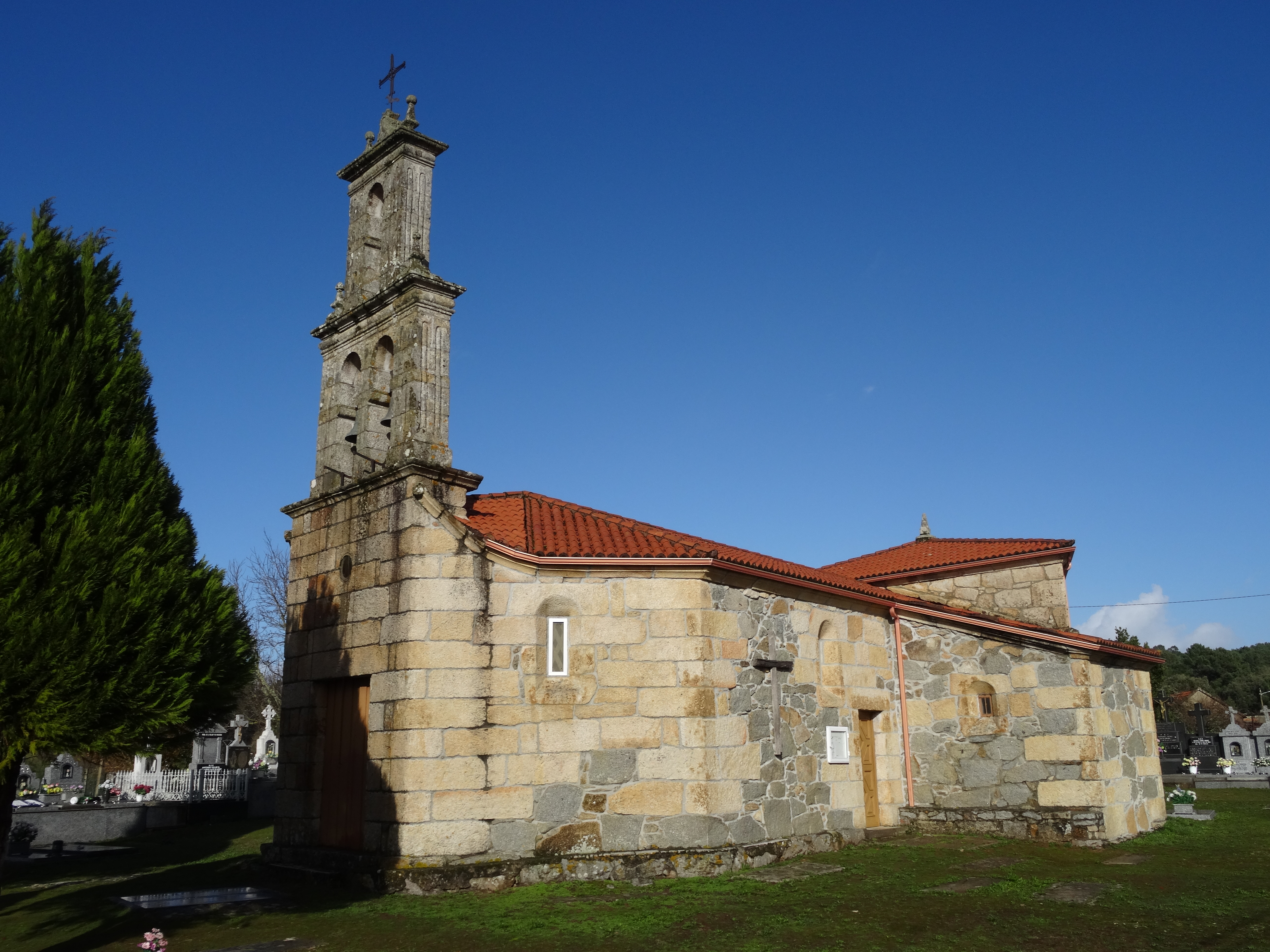 Ver título.